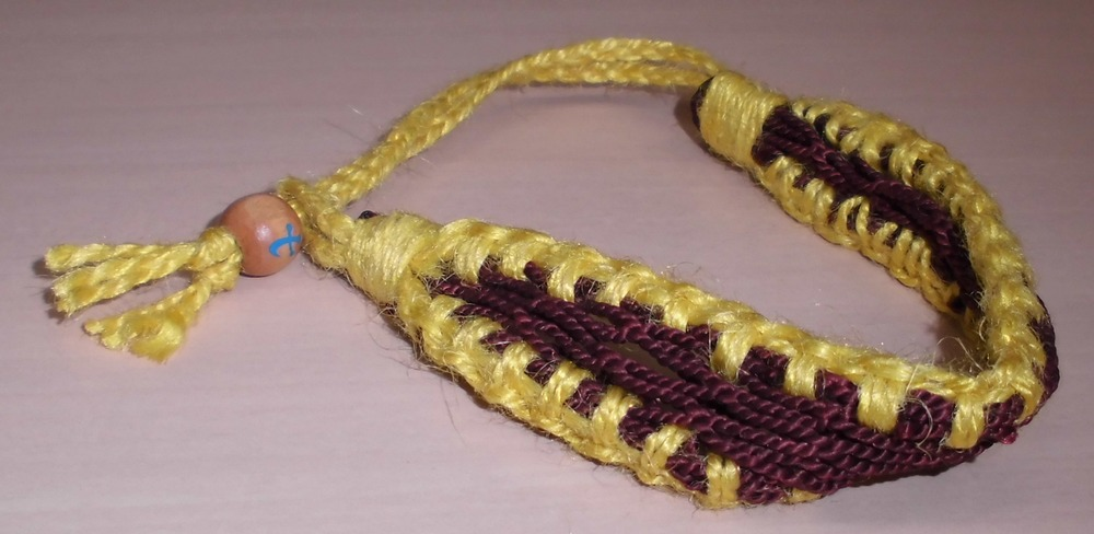 Misanga (Hama no Misanga "Tamaki")